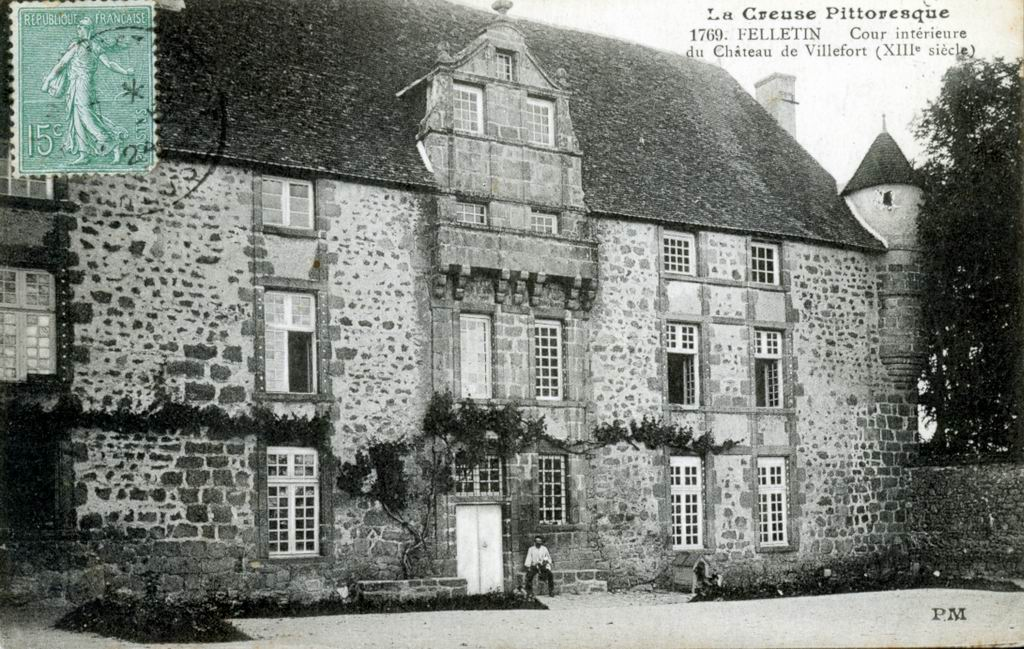 Château de Villefort (carte postale)